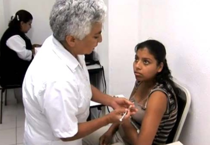 Imatge extreta de